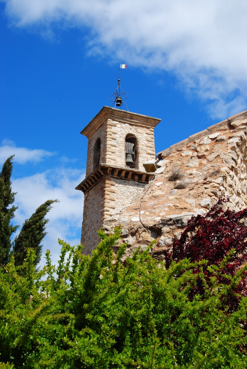 Image du clocher de Gardanne